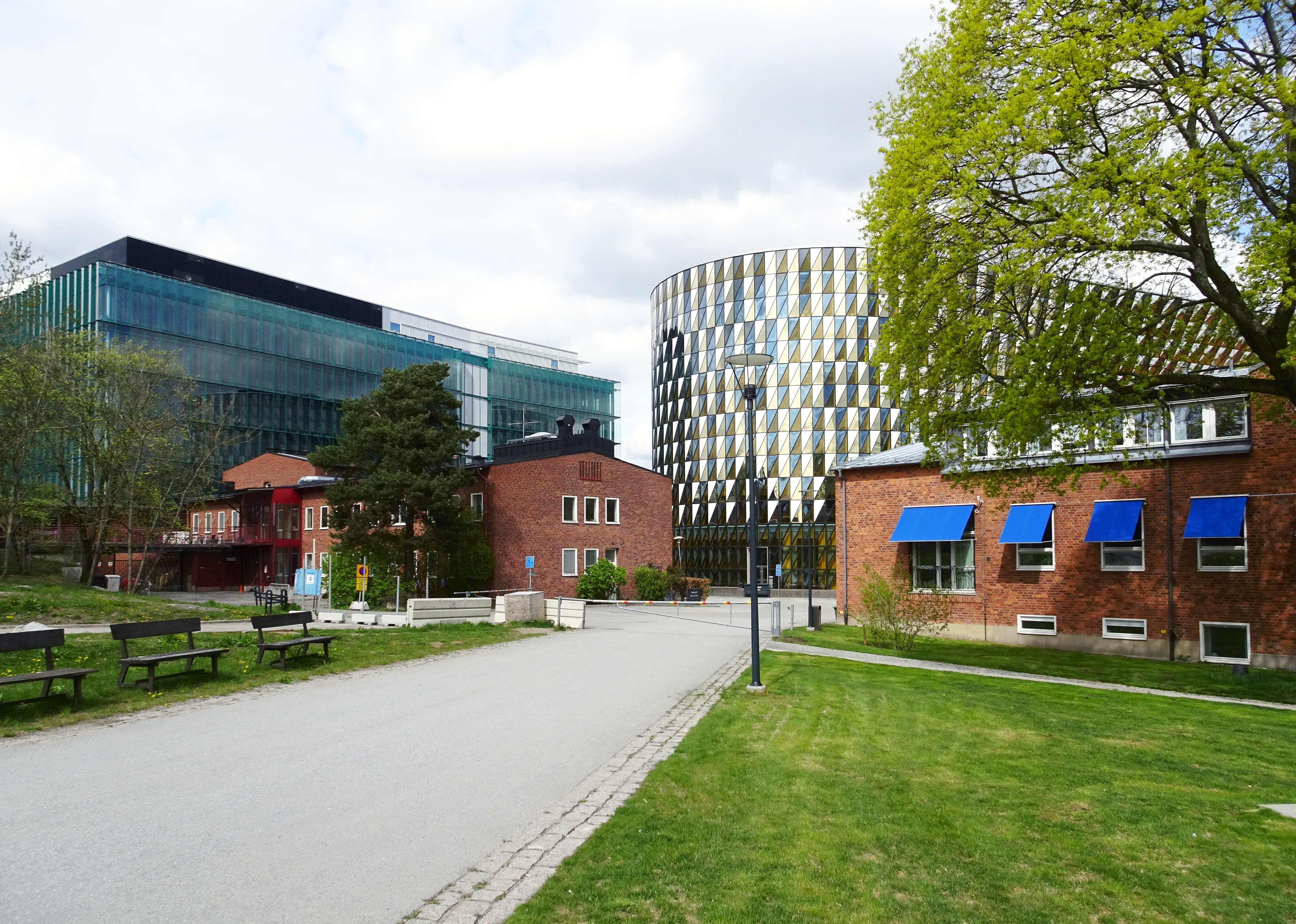 Campus Solna, Nanna Svartz väg, rakt fram Aula Medica, t.v. Biomedicum och framför Medicinska Föreningen, tegelbyggnaderna i förgrunden är ritade av Ture Ryberg